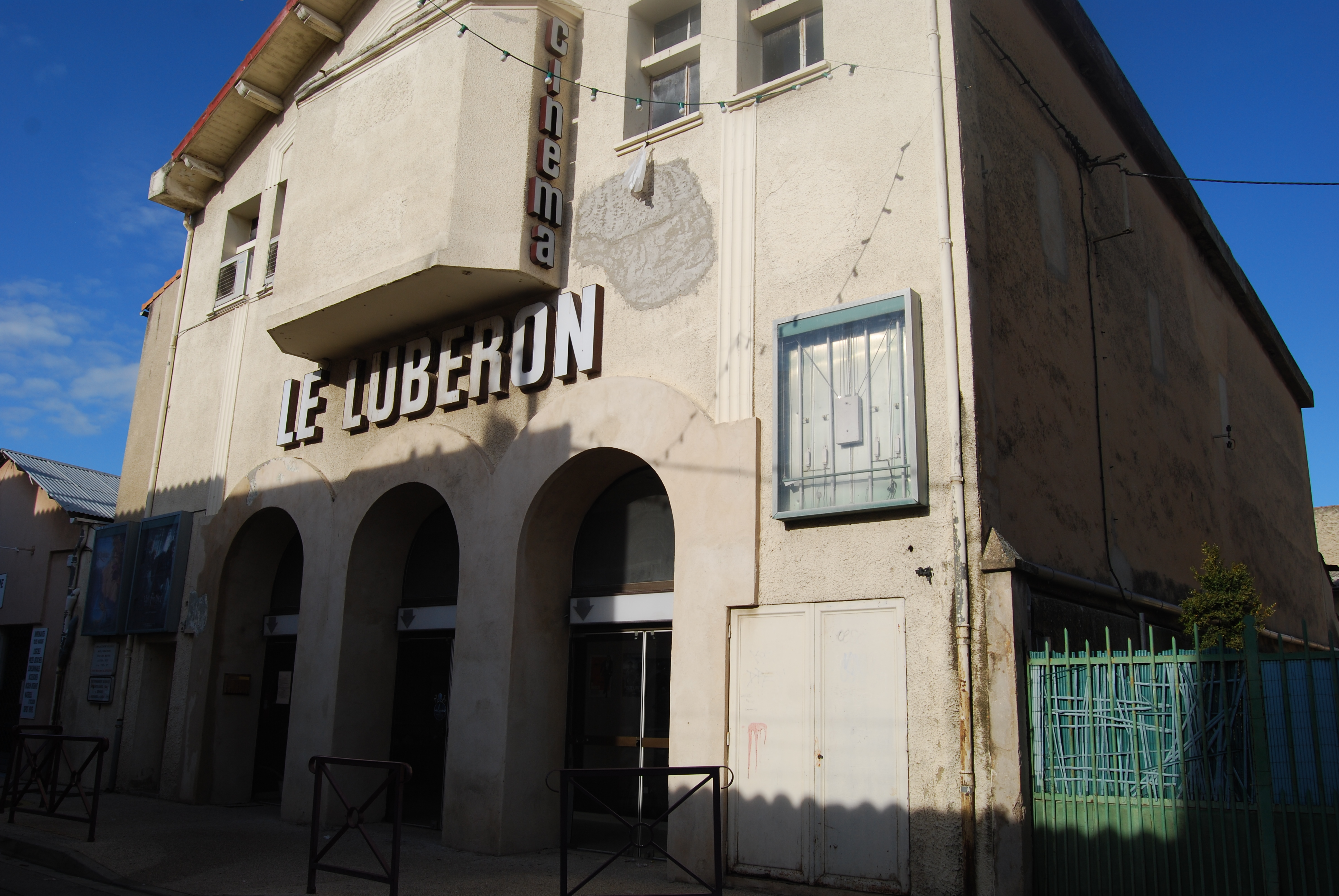 Cinéma Le Luberon à Pertuis